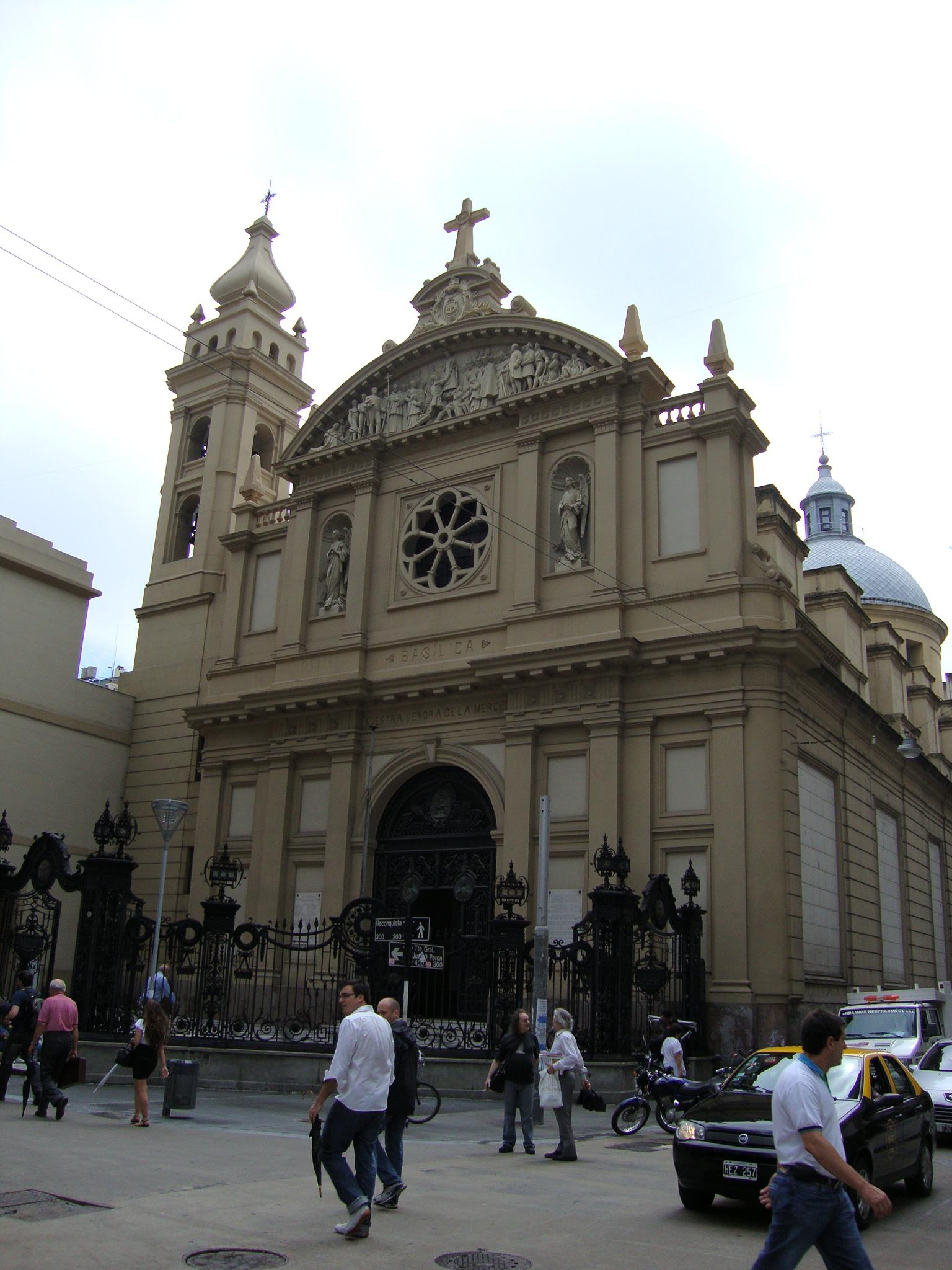 Basílica de Nuestra Señora de la Merced en la ciudad de Buenos Aires, comenzada en 1721 y terminada en 1779. Calles Tte. Gral. Juan D. Perón y Reconquista.